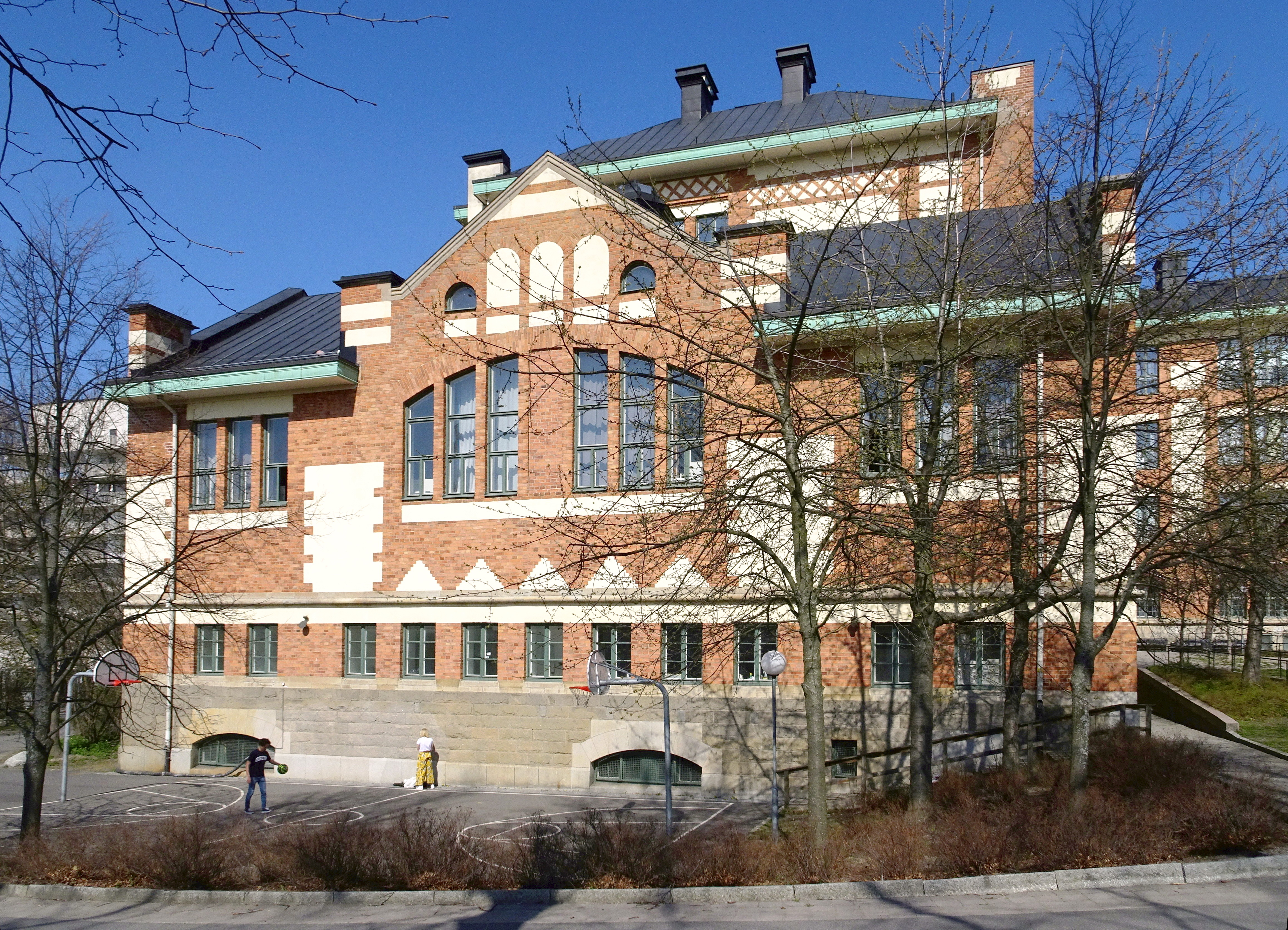 Kungsholmens gymnasium